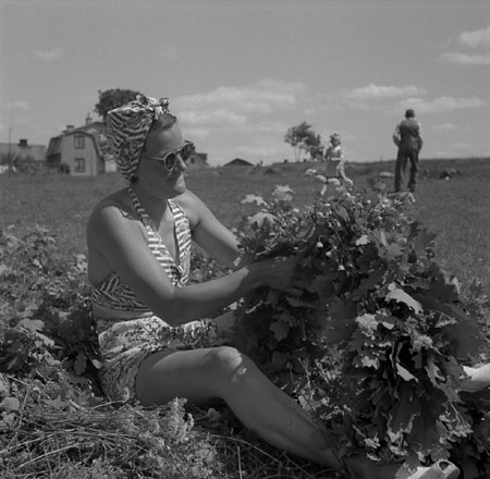 En kvinna i s.k. solliv, shorts och solglasögon sitter och binder kransar till midsommarstången, någonstans strax utanför Växjö.